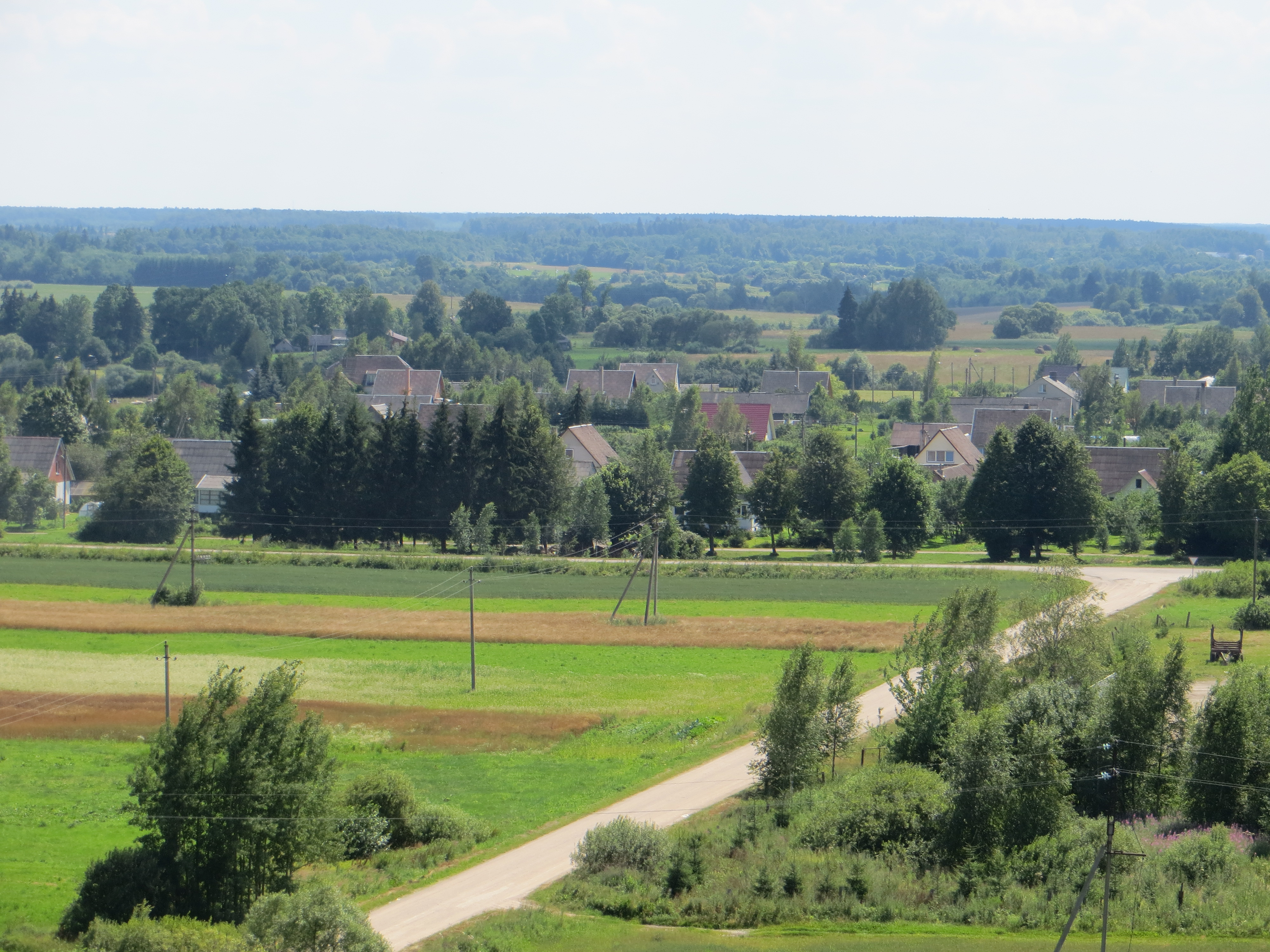 Širvintų sen., Lithuania